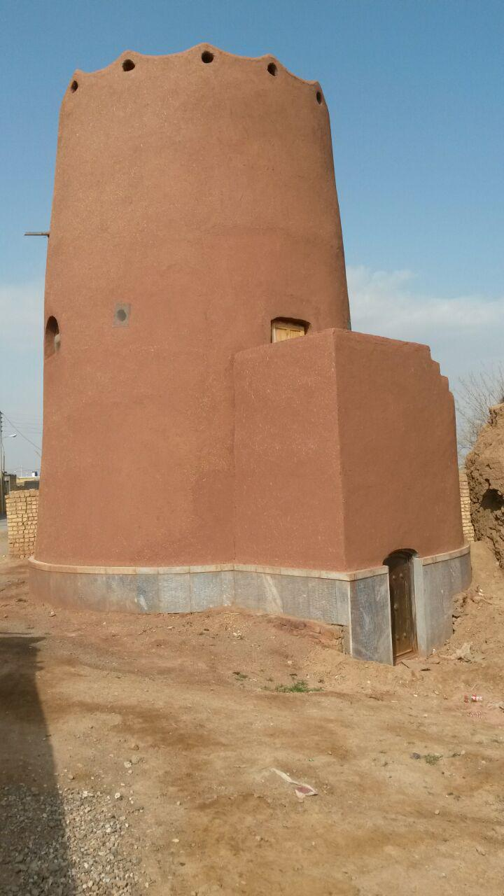 برج بازسازی شده